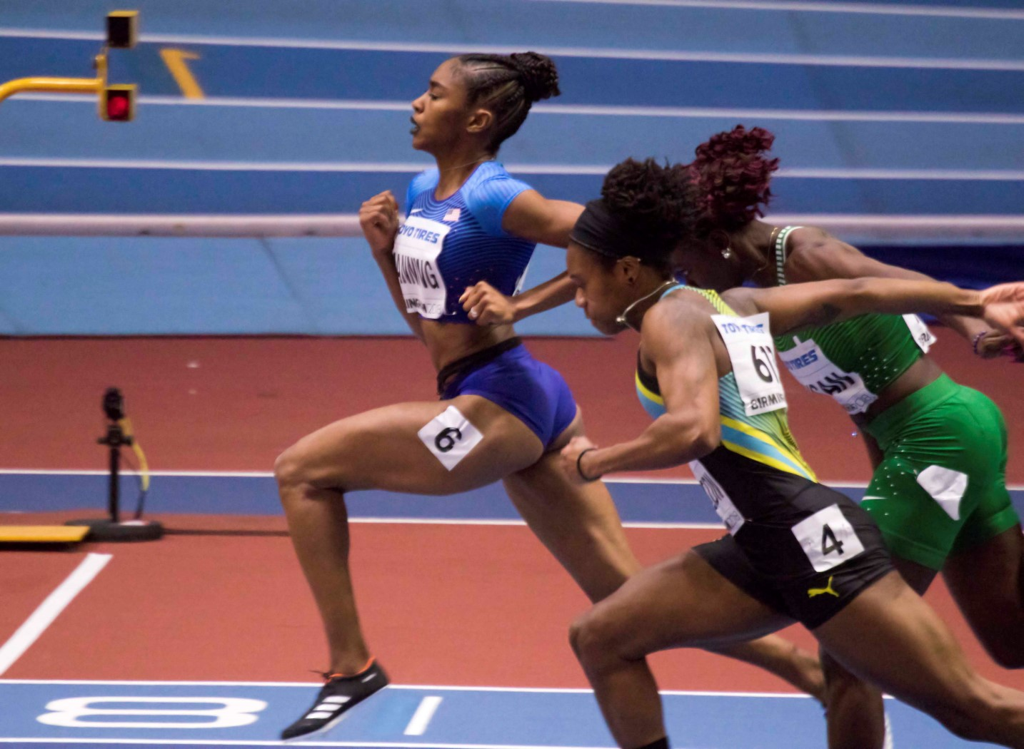 WK3B0009 halve finale 60mH manning